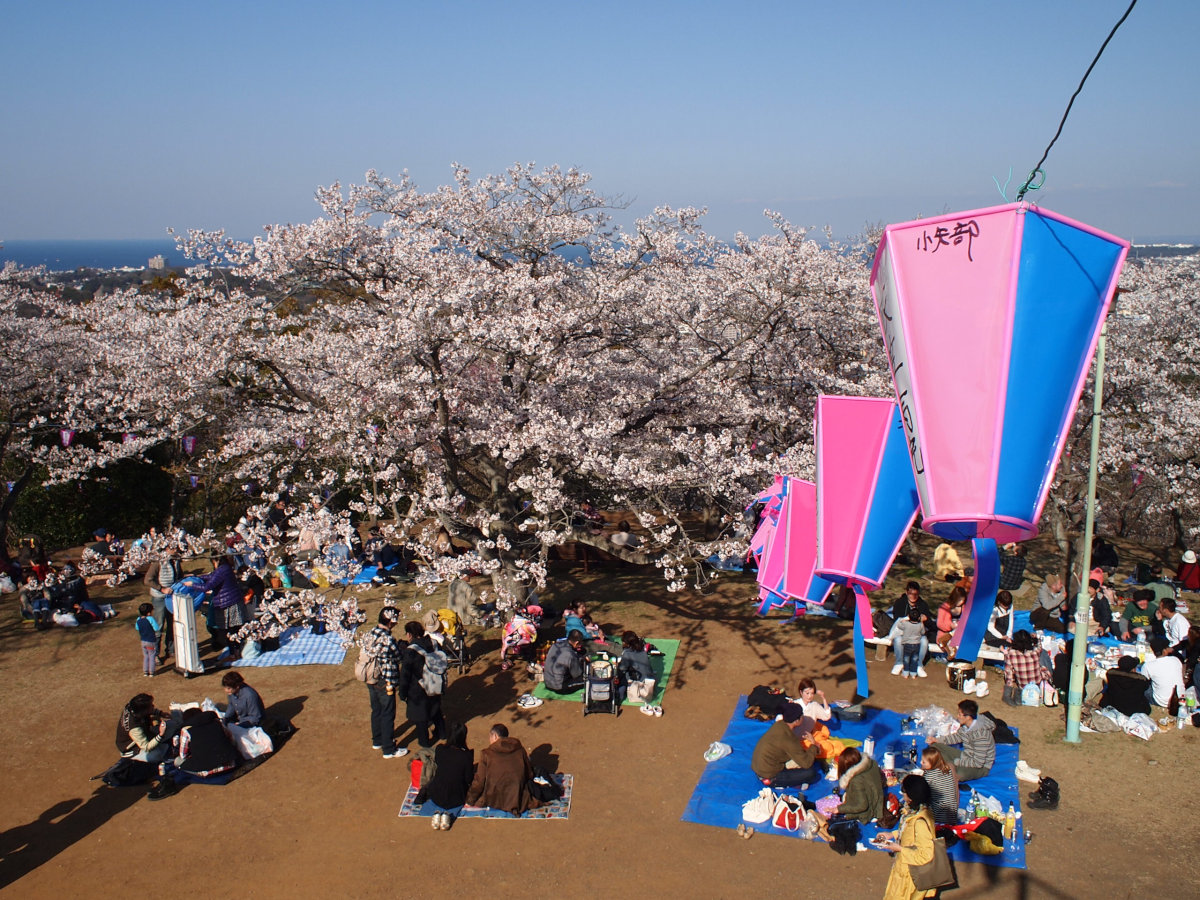 衣笠山公園。神奈川県横須賀市。2012年4月8日撮影